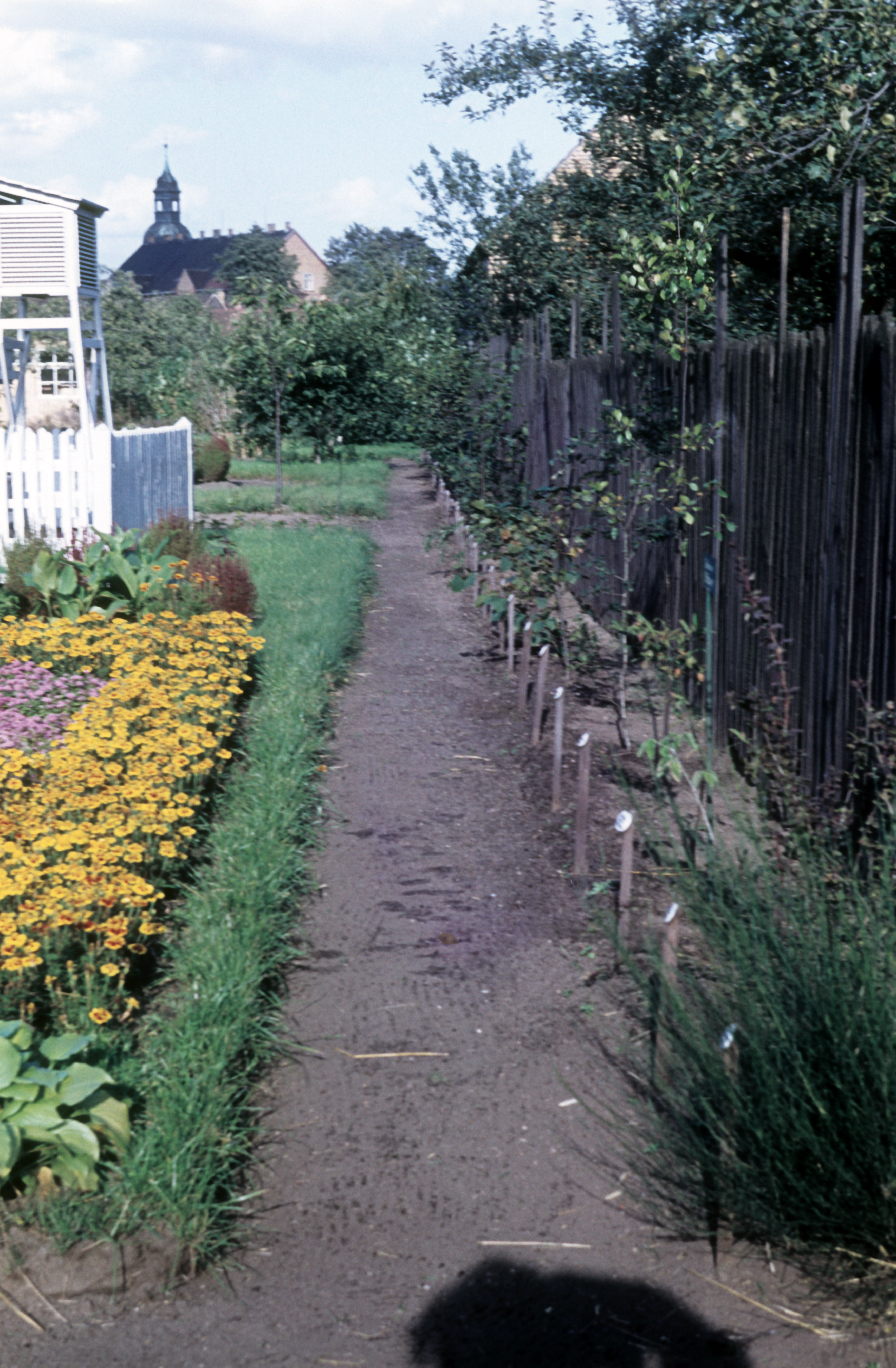 Ruhland, Hartwigstraße, Schulgarten, Teil-Westansicht (Rabatten und Beerensträucher entlang des Weges am südlichen Zaun)